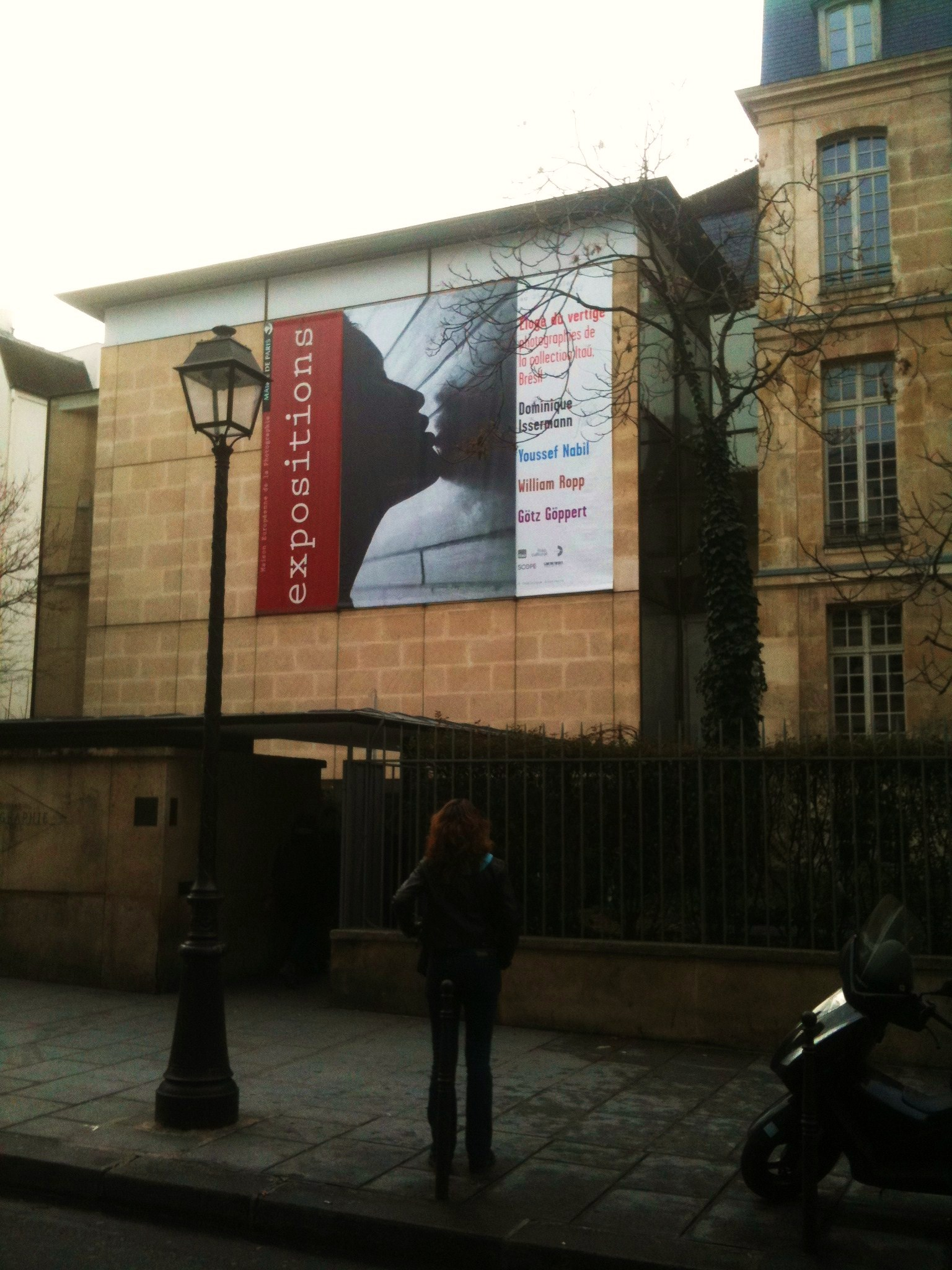 Maison Européenne de la Photographie (Paris), façade